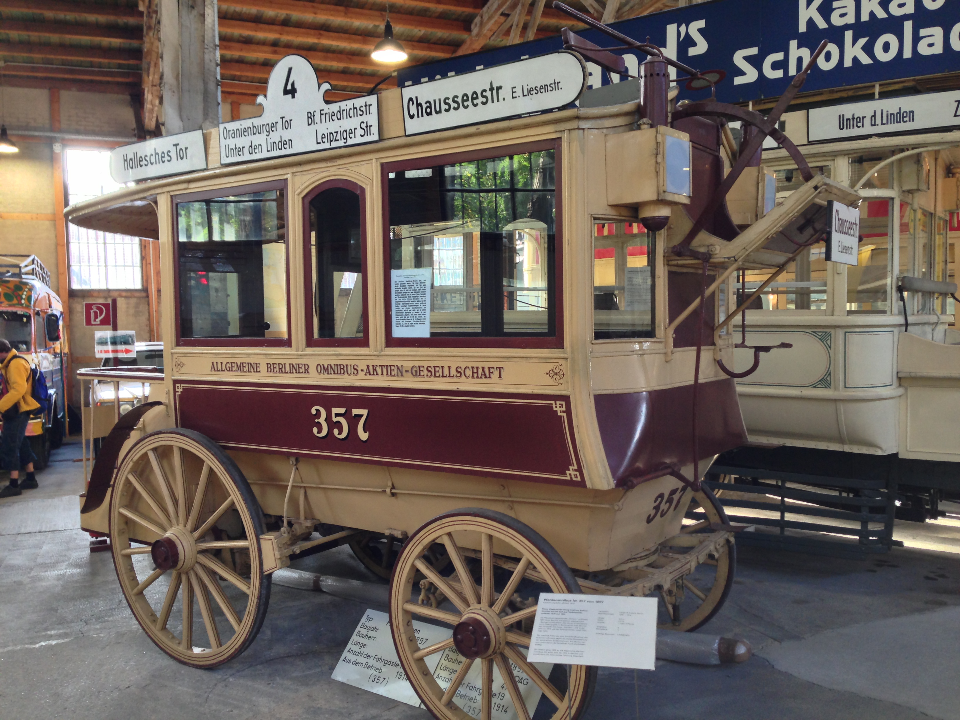 Depot des Deutschen Technikmuseums Berlin